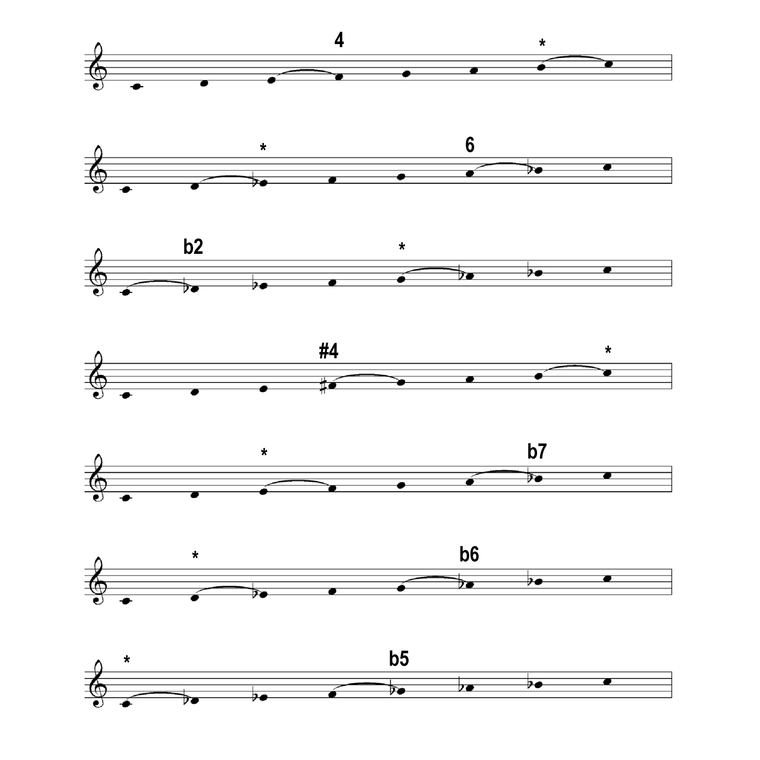 NotasCaracteristicas